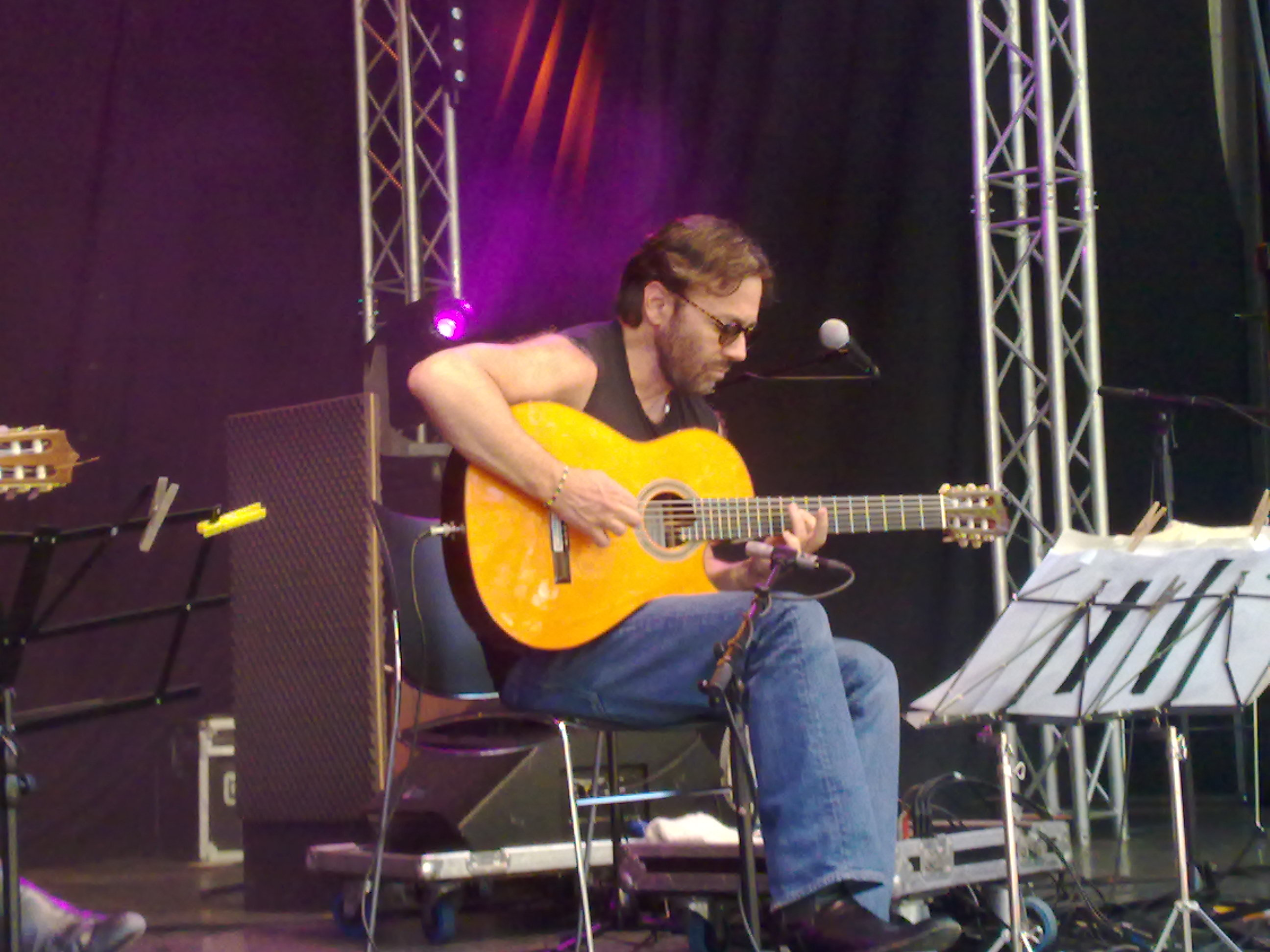 Picture